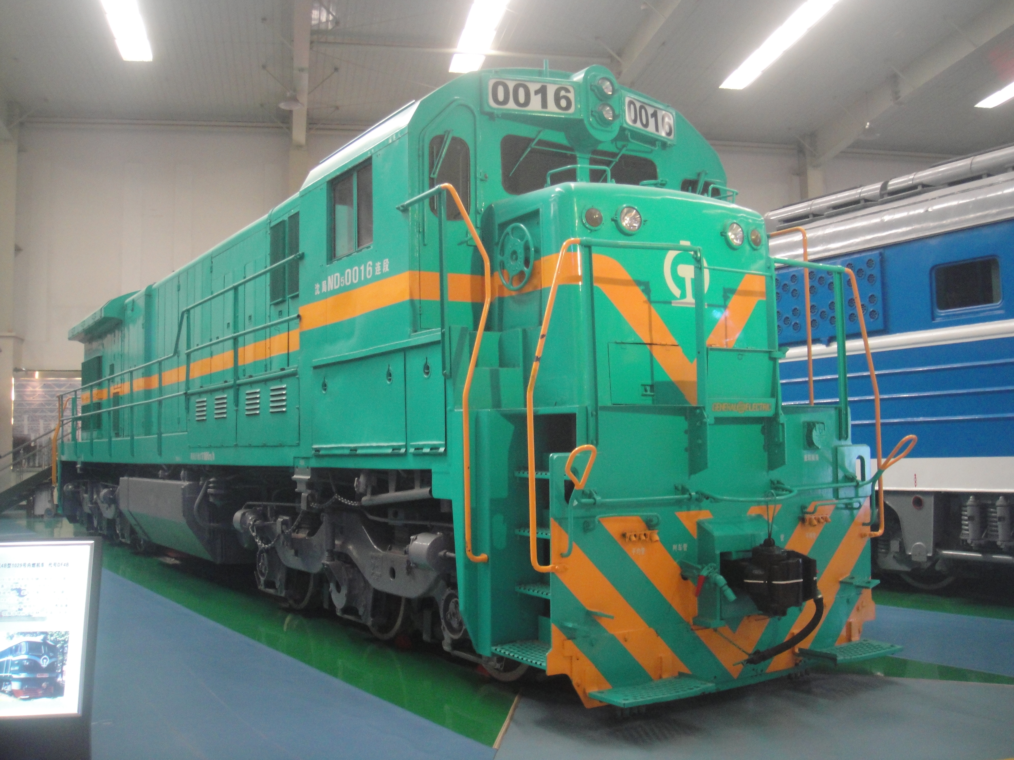 沈阳铁路陈列馆中的 ND5 型内燃机车